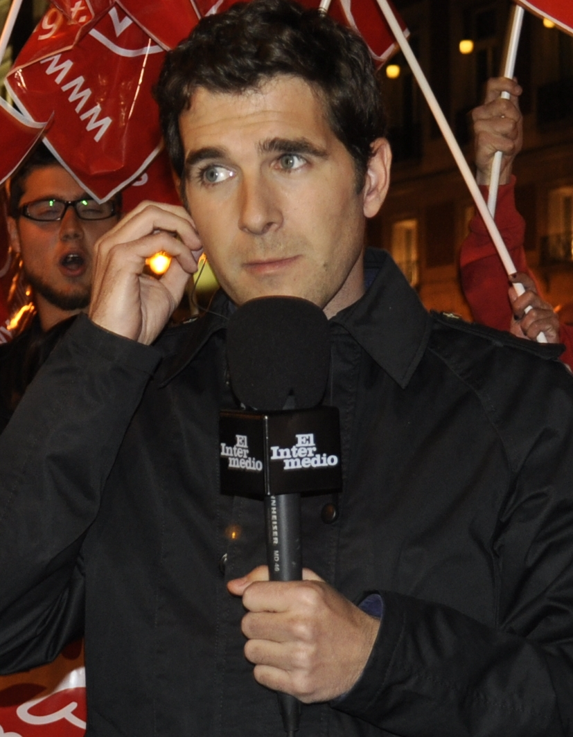 El periodista Fernando González «Gonzo» durante una entrevista en el inicio de la huelga general en España del 29 de marzo de 2012.